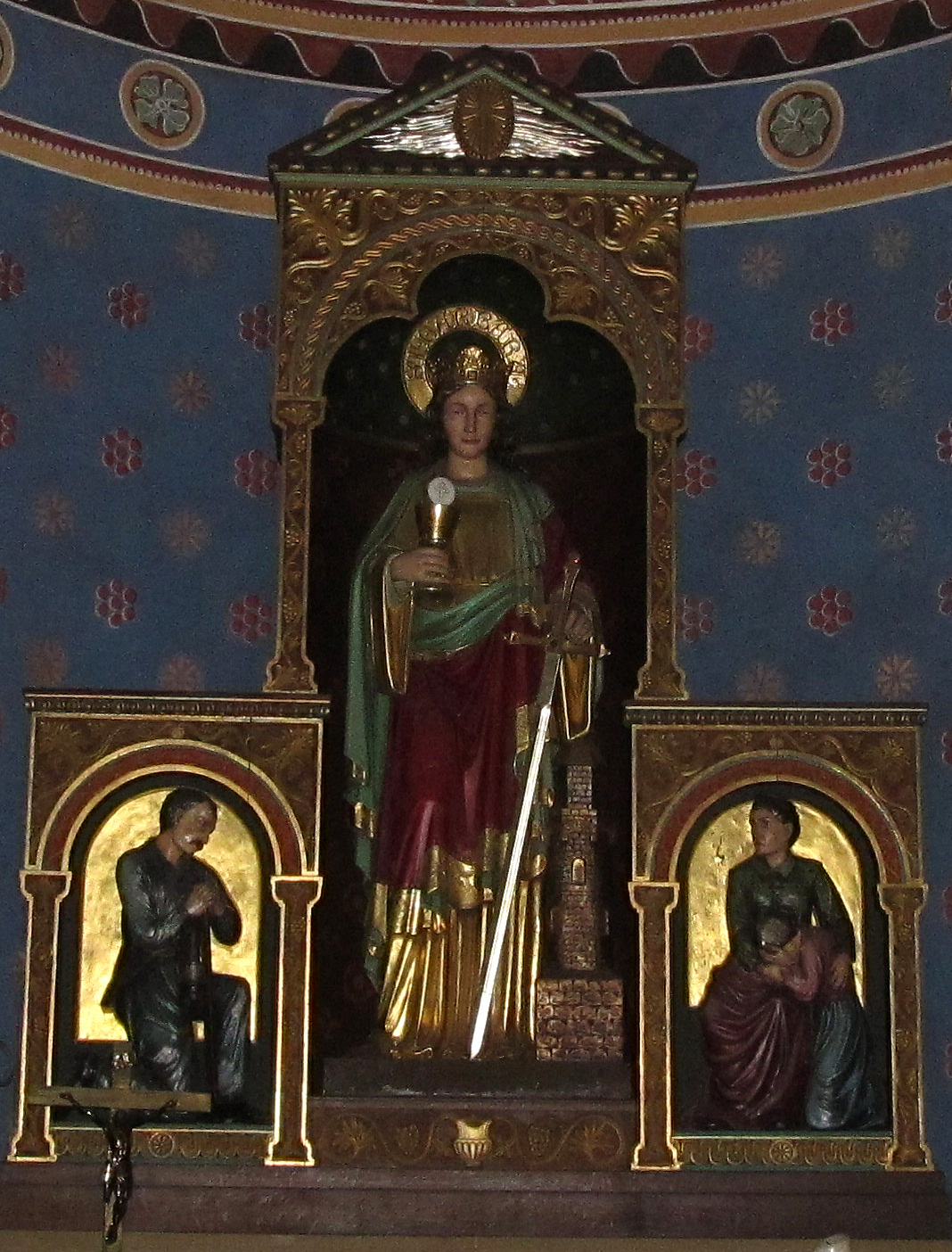 Figur der Hl. Barbara in der katholischen Pfarrkirche St. Paulinus in Lauterbach, einem Stadtteil von Völklingen, Saarland